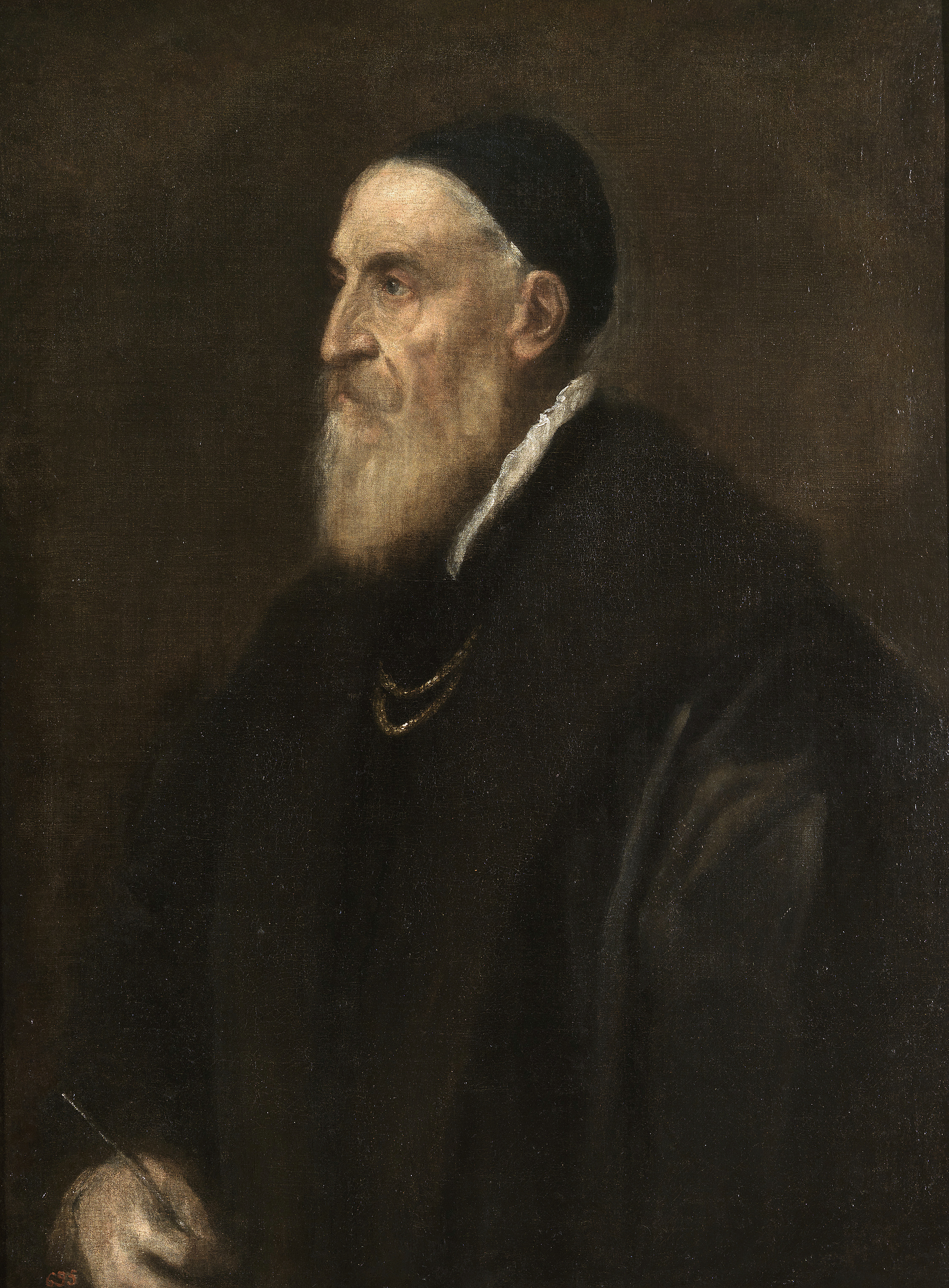 Autorretrato del pintor italiano Tiziano Vecellio (c. 1490-1576), más conocido como Tiziano.